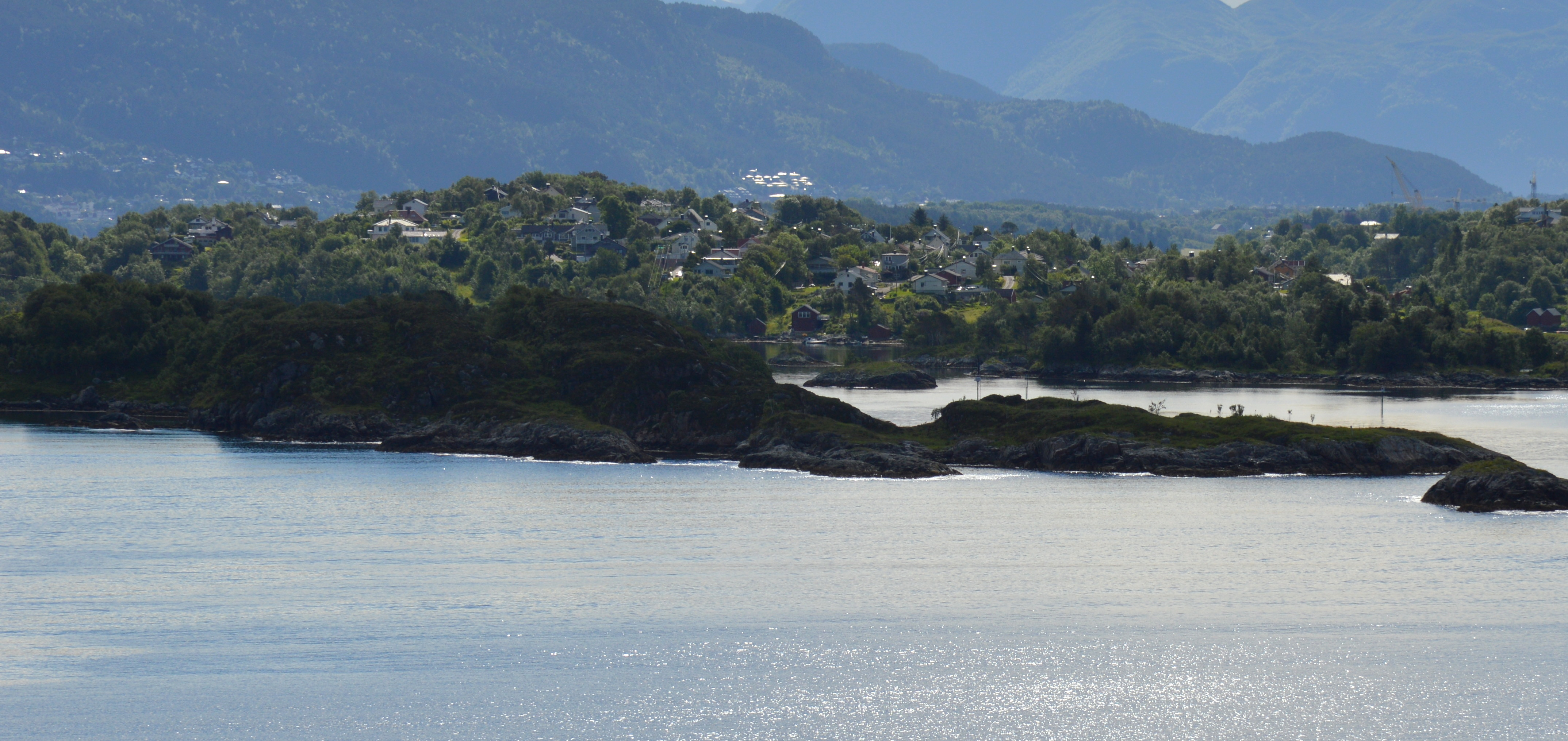 Insel Storholmen bei Alesund